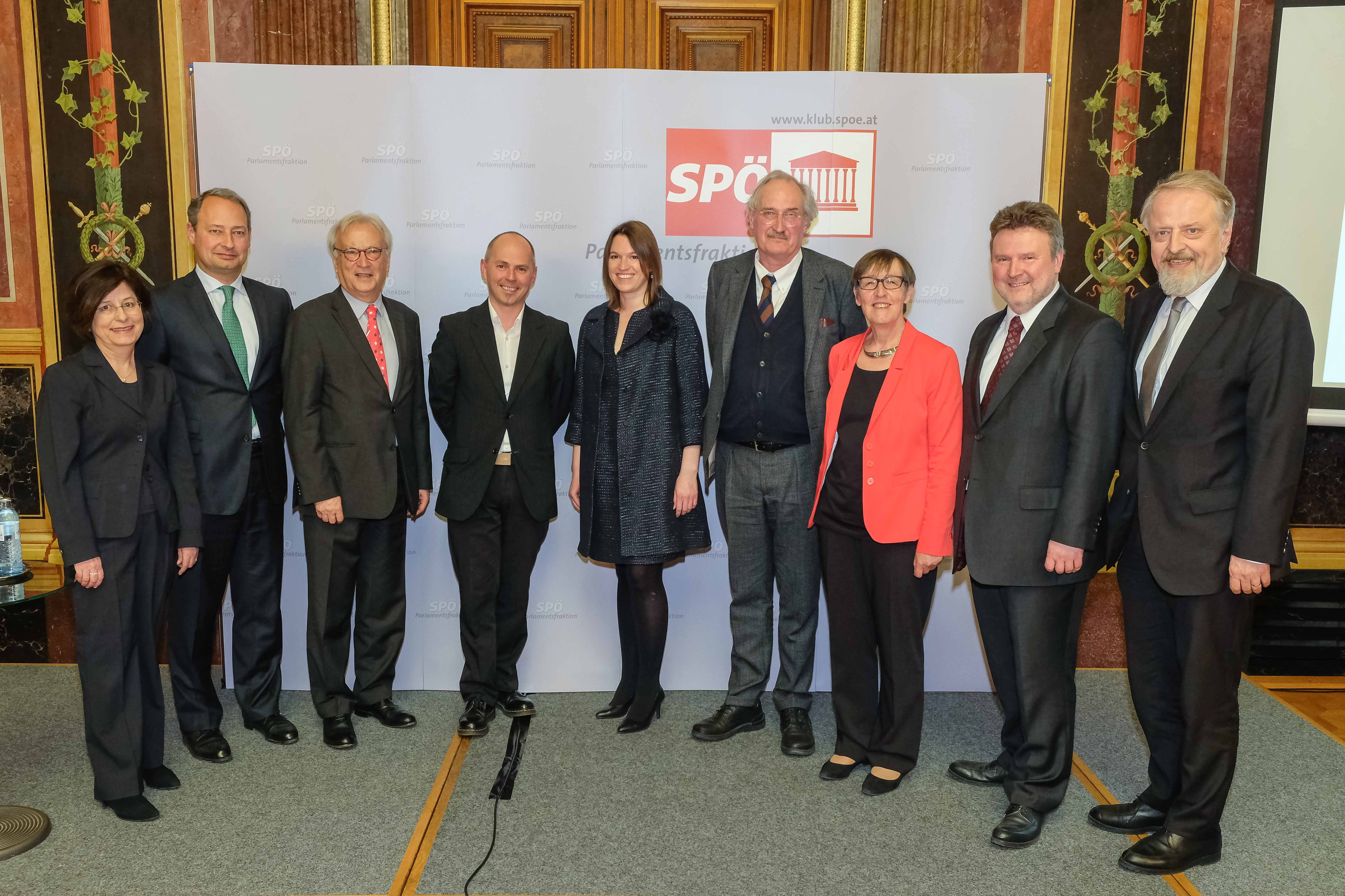 Foto: Walter Henisch, Bruno-Kreisky-Preis für das Politische Buch 2015. Von links nach rechts: Barbara Rosenberg, Andreas Schieder, Hannes Swoboda, Michael Rosecker, Martina Nemeth, Axel Honneth, Brigitte Bailer-Galanda, Michael Ludwig, Gerhard Schmid.